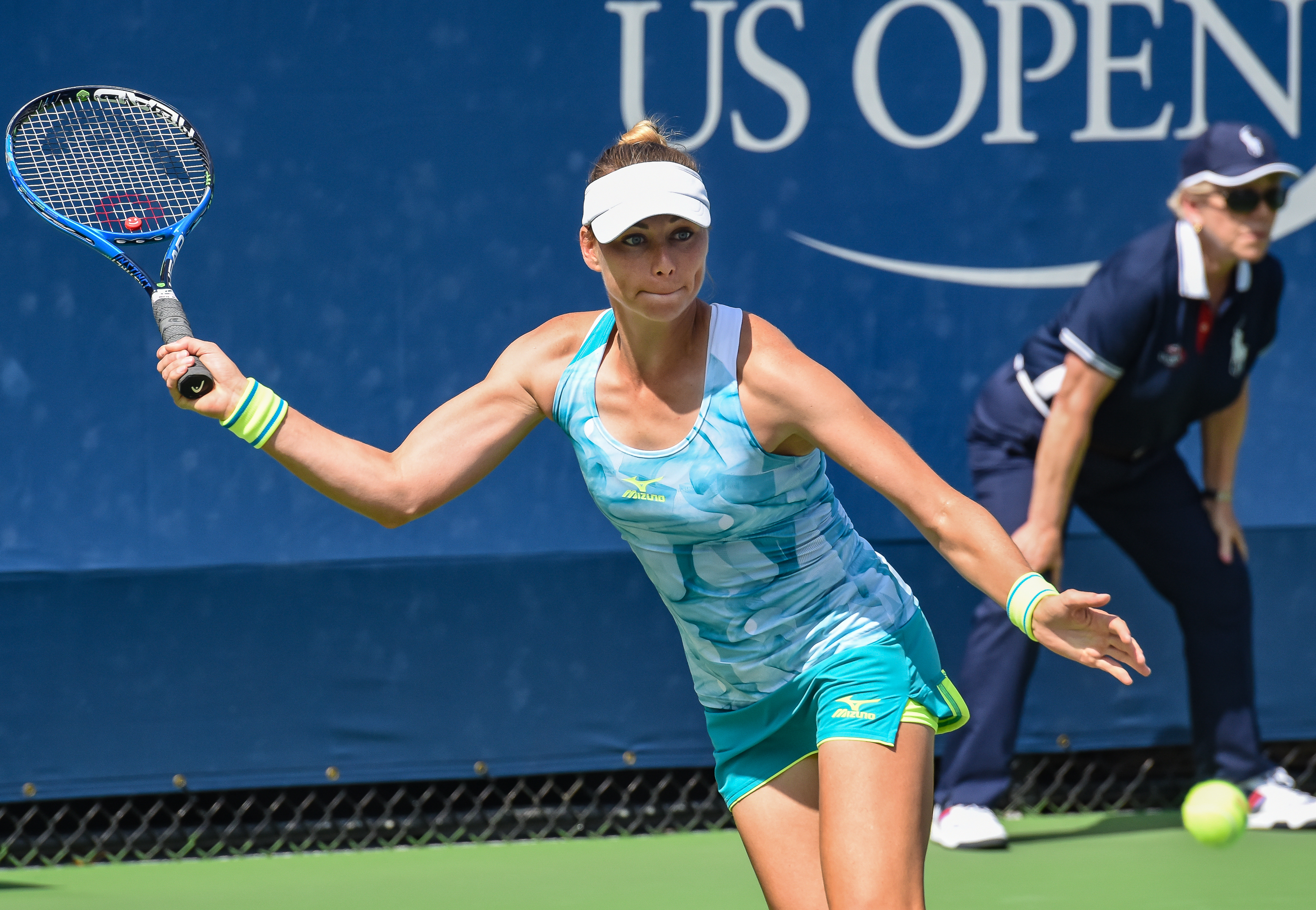 August 24, 2017 Court 15 Flushing, NY Vera Zvonareva.